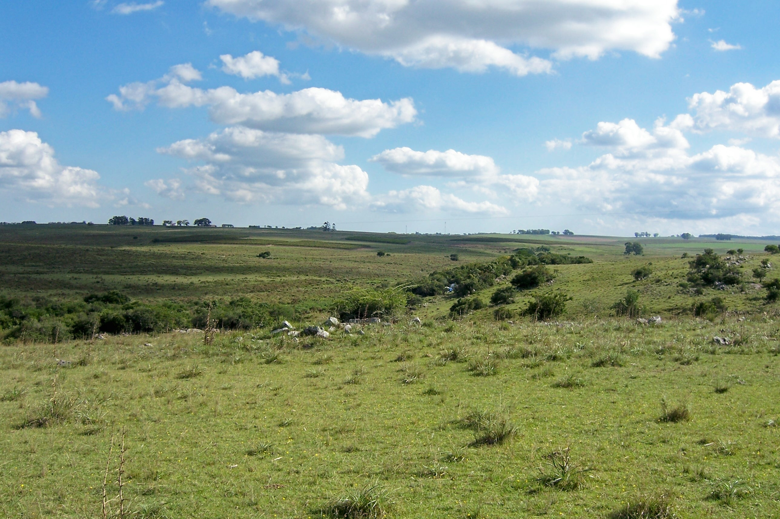 Pradera y bosque de ribera, próximo a Sierra de Mal Abrigo, departamento de San José (Uruguay).